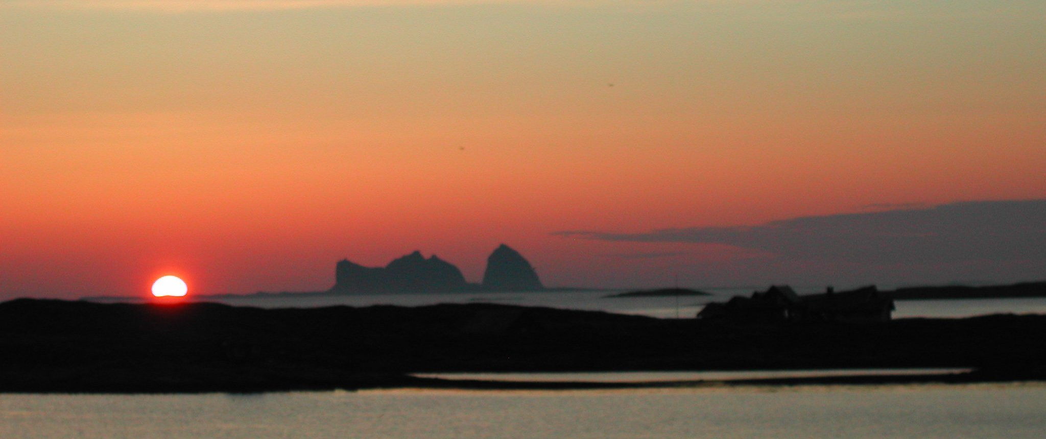 Sunset by Træna, from Lovunda